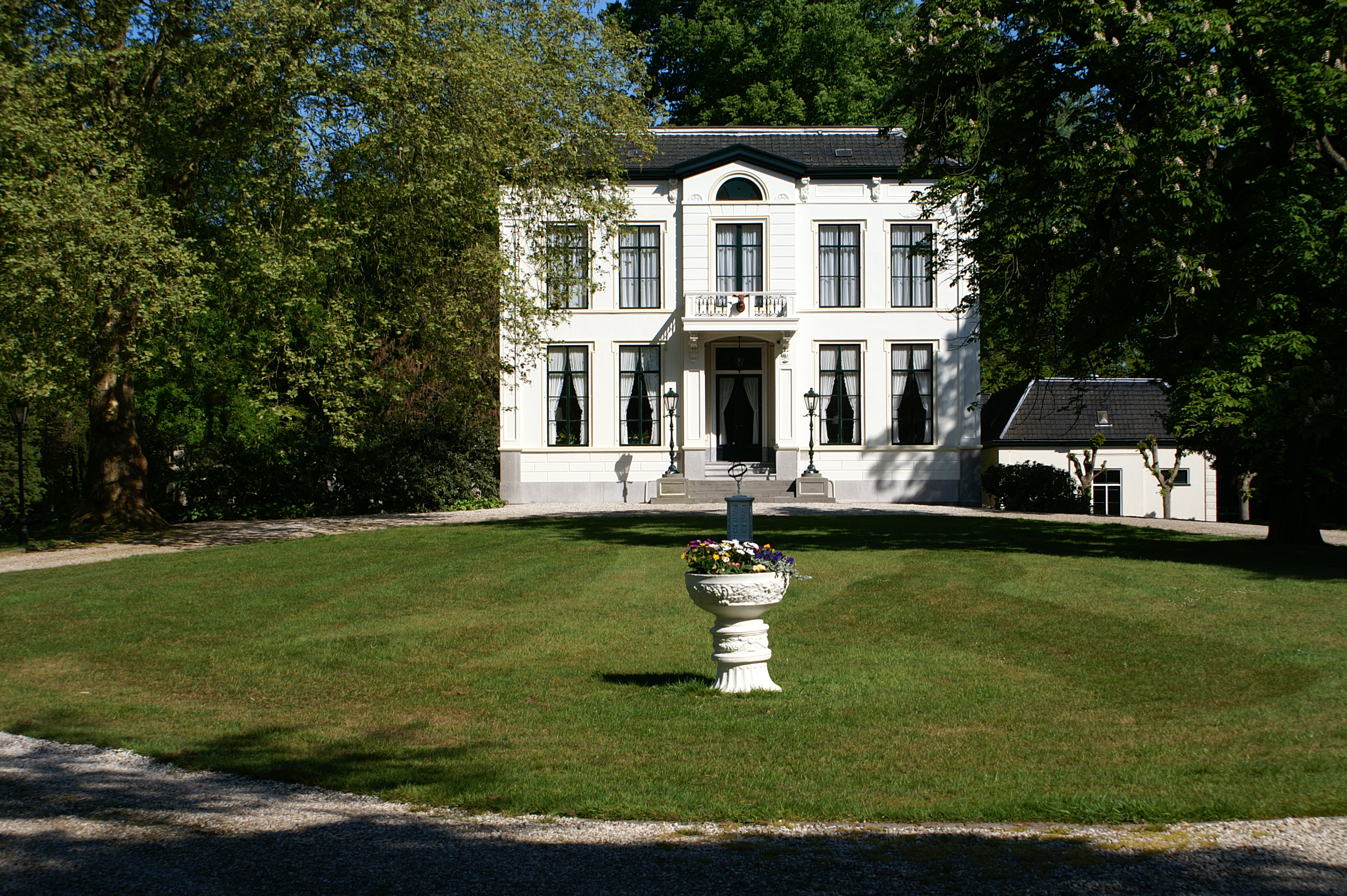 Huize Klein Jagtlust te Oranjewoud.